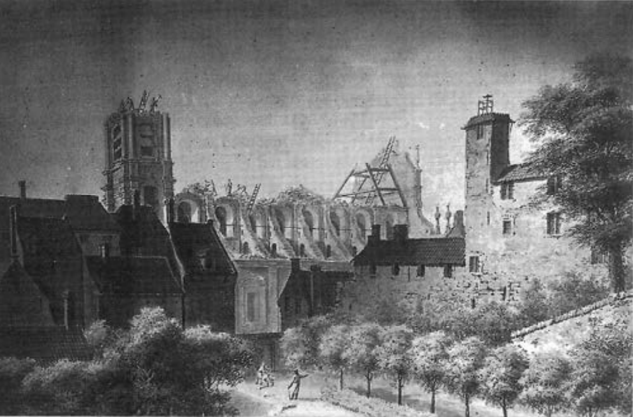 Vue de l’église des Jésuites de Bruxelles par Jacques Joseph Spaak en 1811